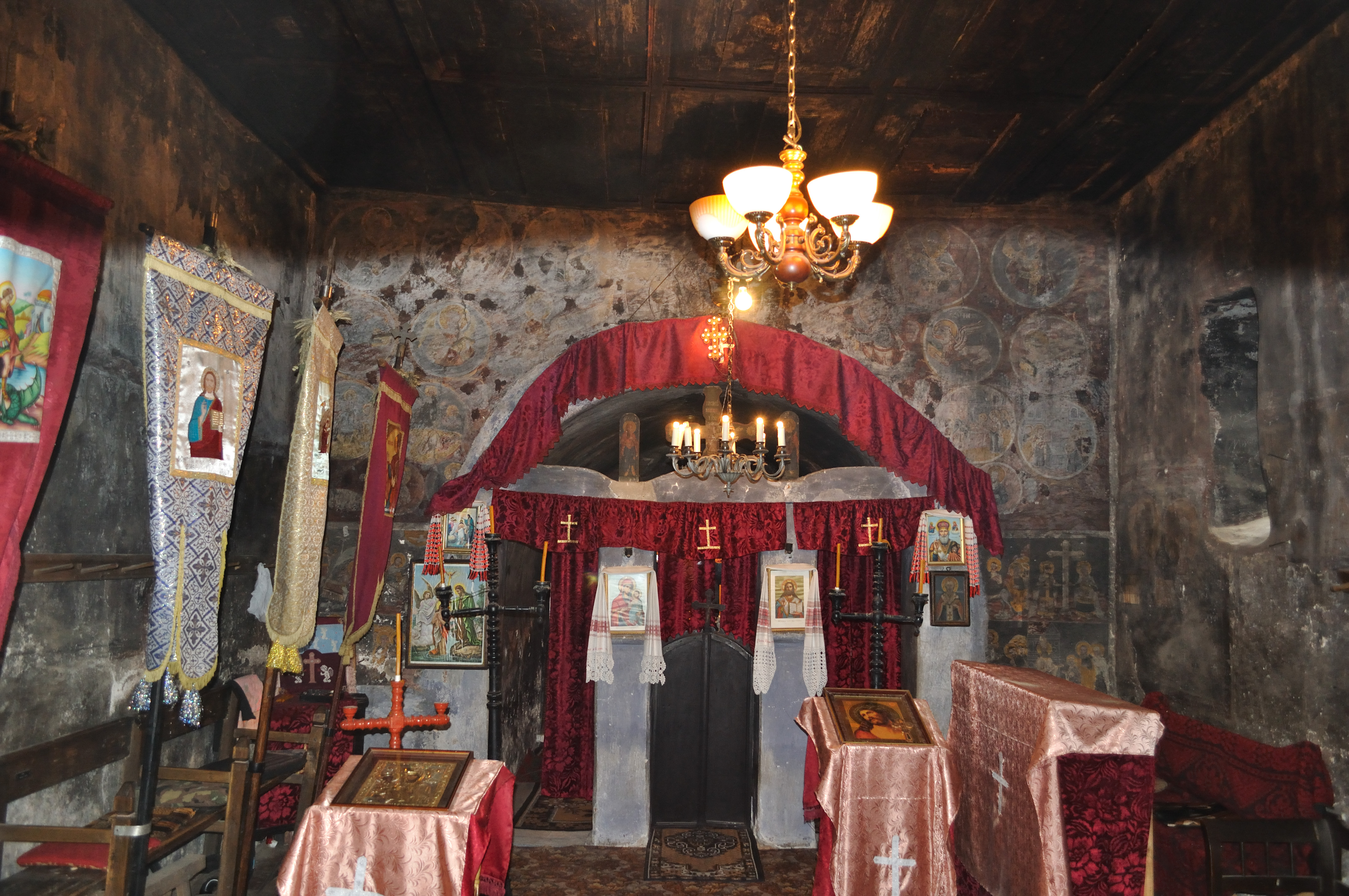 Biserica „Sfântul Nicolae” din Leșnic, județul Hunedoara